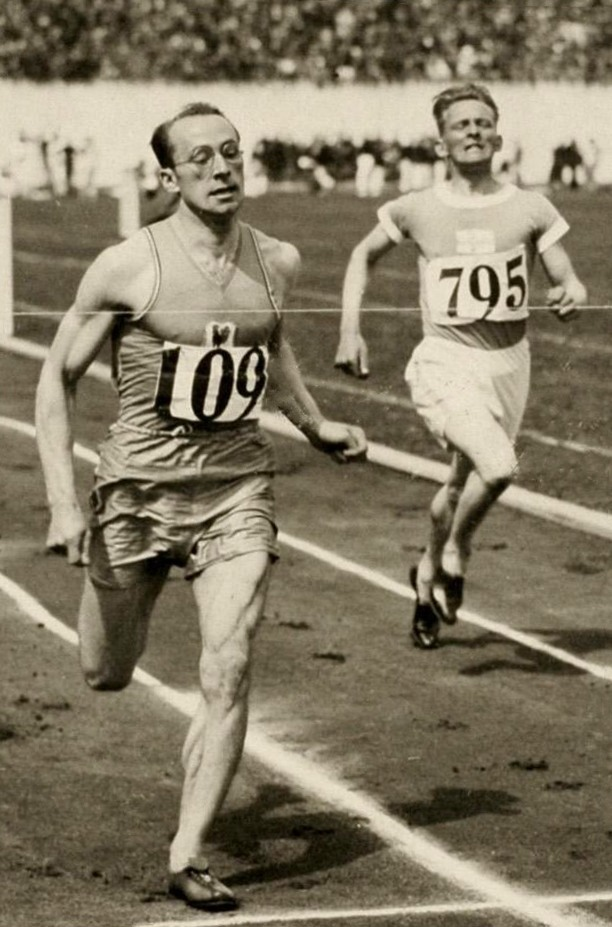 Sport. Olympische Spelen 1928 Amsterdam, Nederland : De Fransman R. Viel wint de derde serie van de 400 m horden.